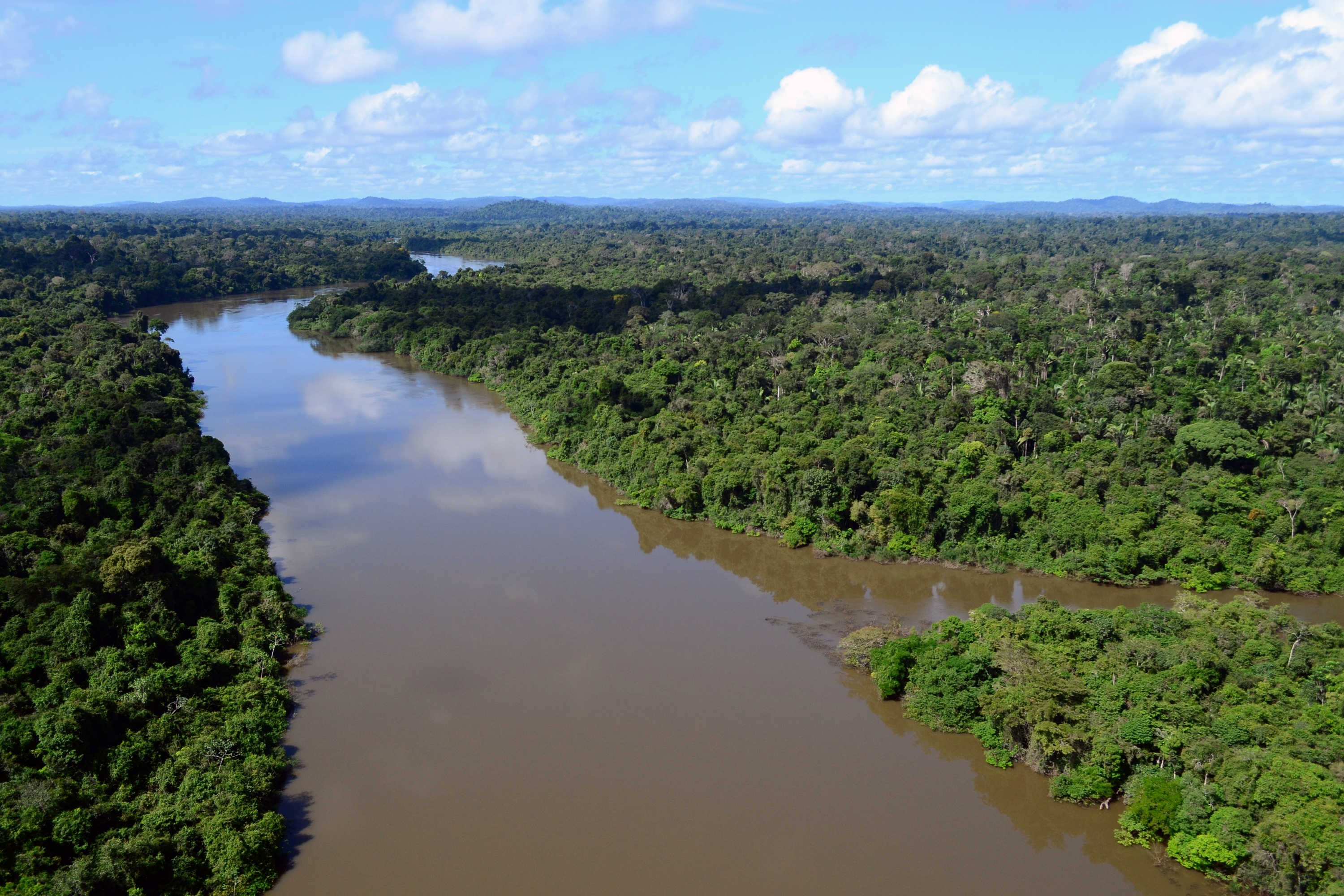 Vista aérea do Rio Jamanxim em Novo Progresso, Pará. Foto: Vinícius Mendonça - Ascom/Ibama.